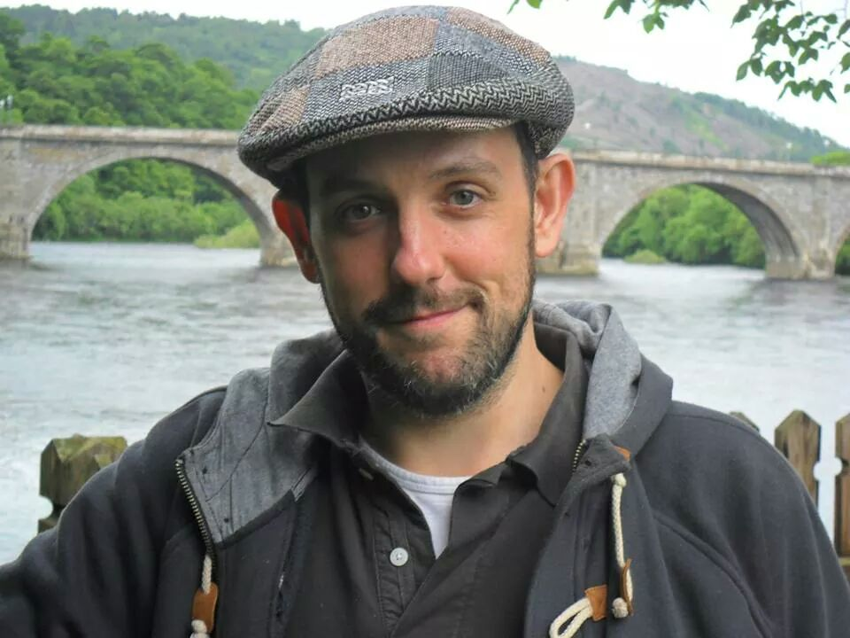 Javier Quevedo Puchal